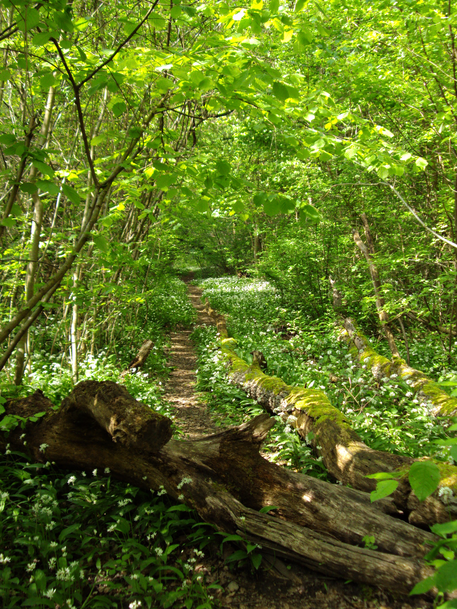 Réserve naturelle nationale du massif forestier de Strasbourg-Neuhof/Illkirch-Graffenstaden